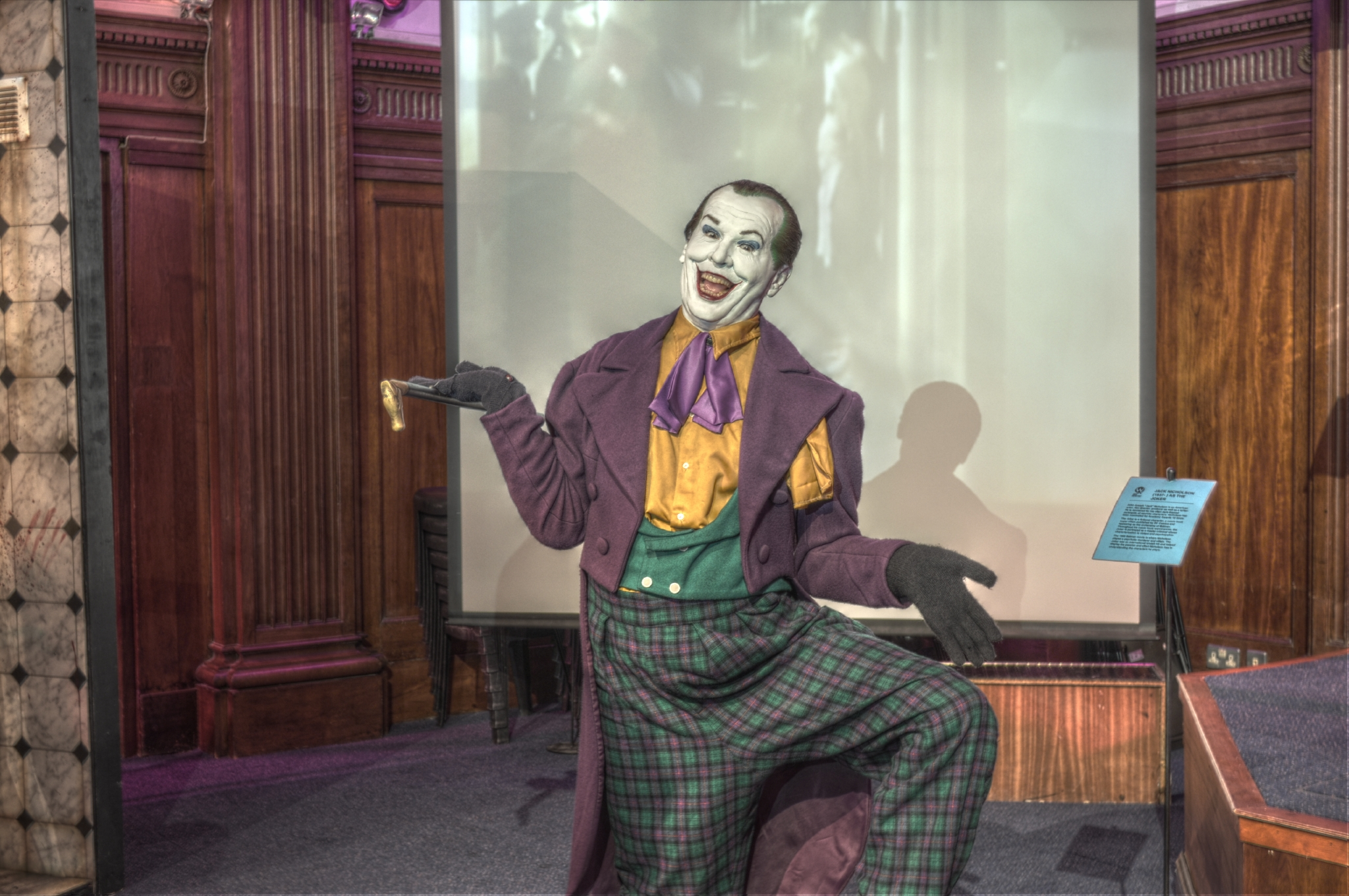 Camera: Nikon D5000 Luminance HDR, Mantiuk '06